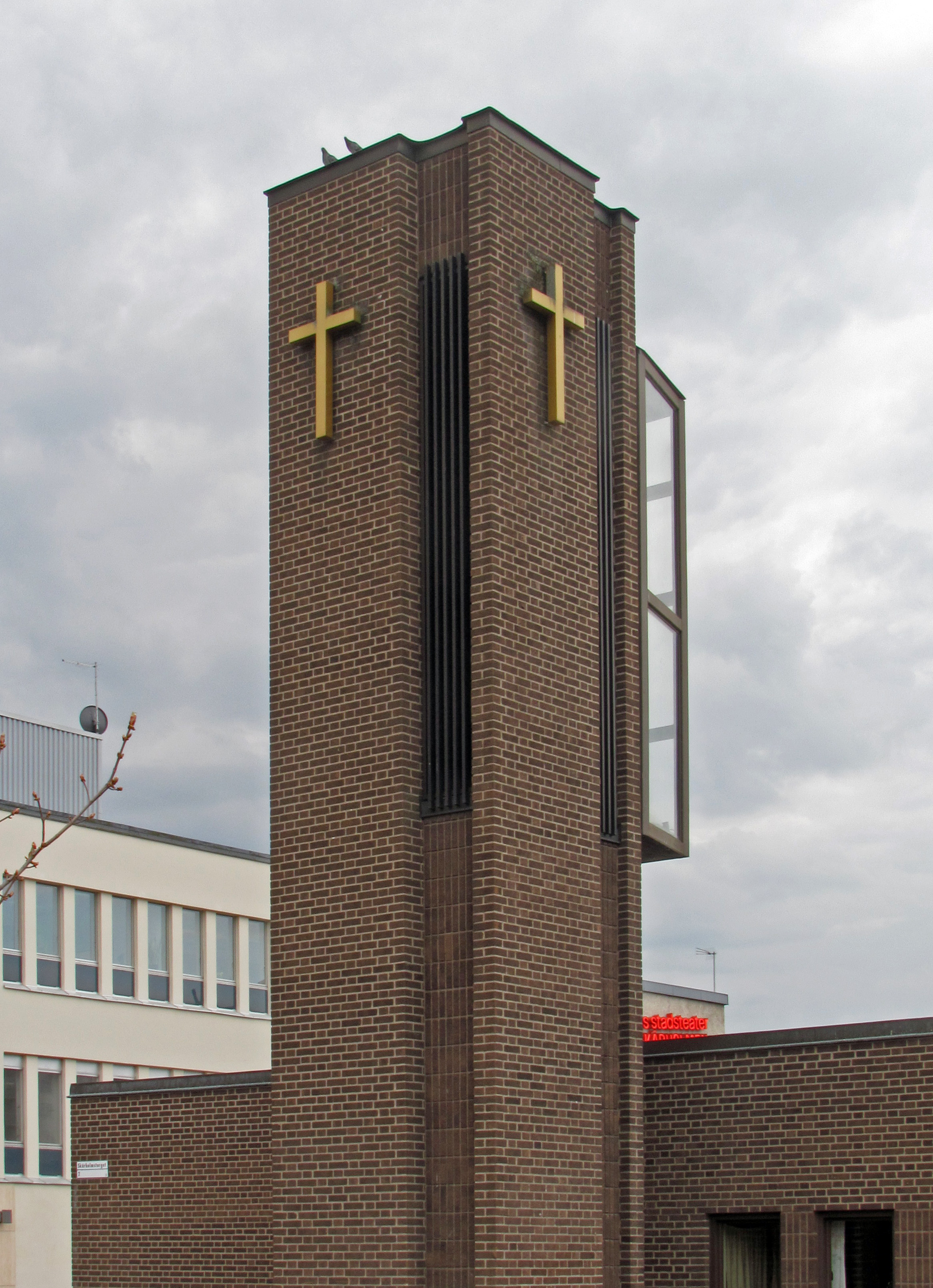 Skärholmens kyrka, klockstapeln